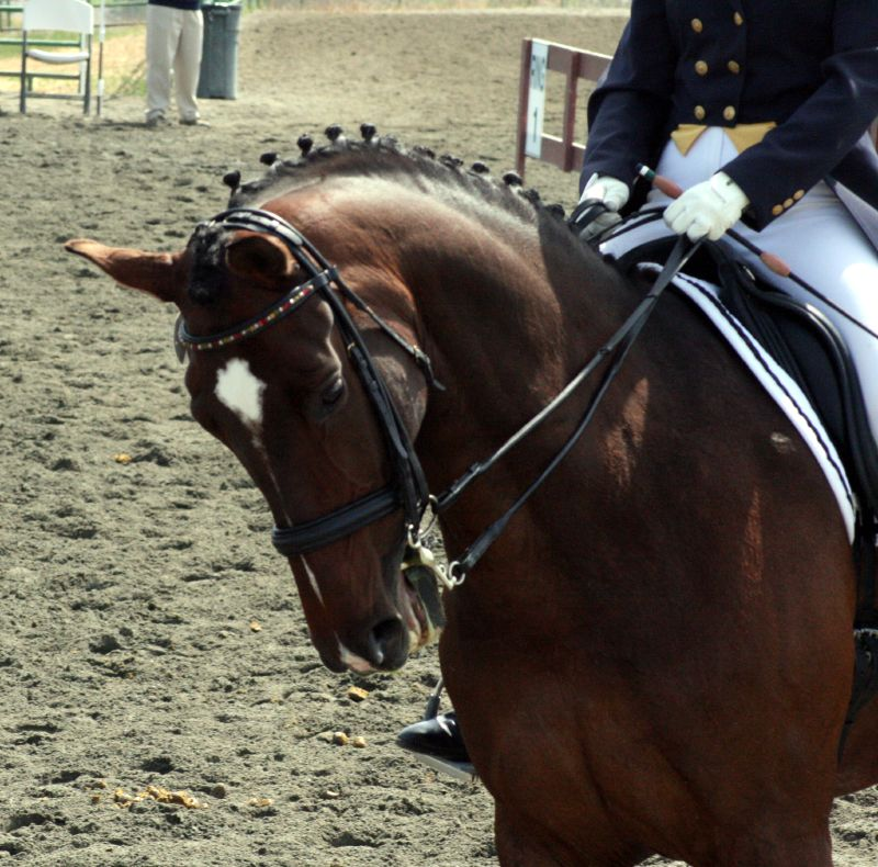 braided mane